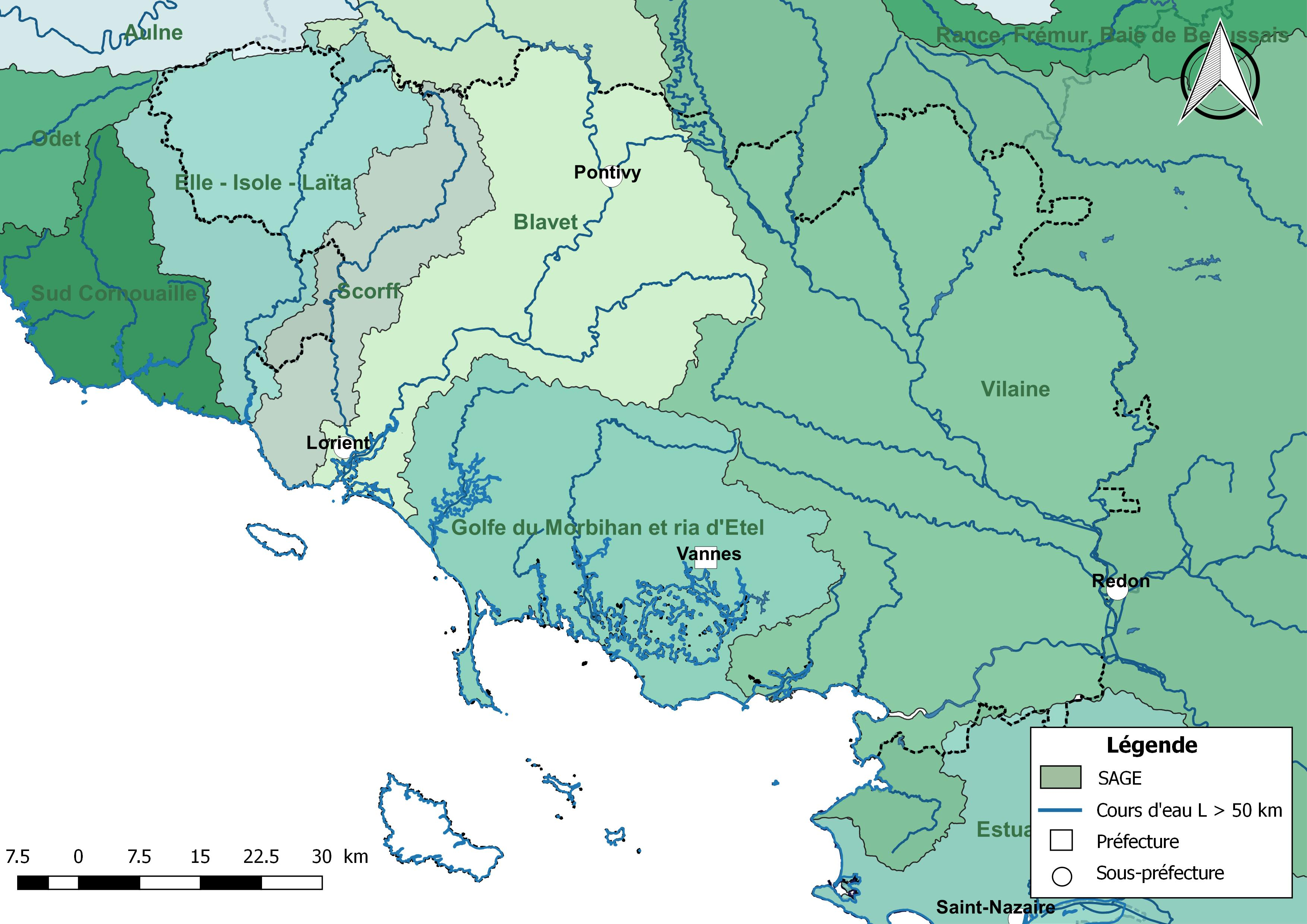 Carte des schémas d'aménagement et de gestion des eaux (SAGE) concernant le département du Morbihan (France) au 1er janvier 2018.